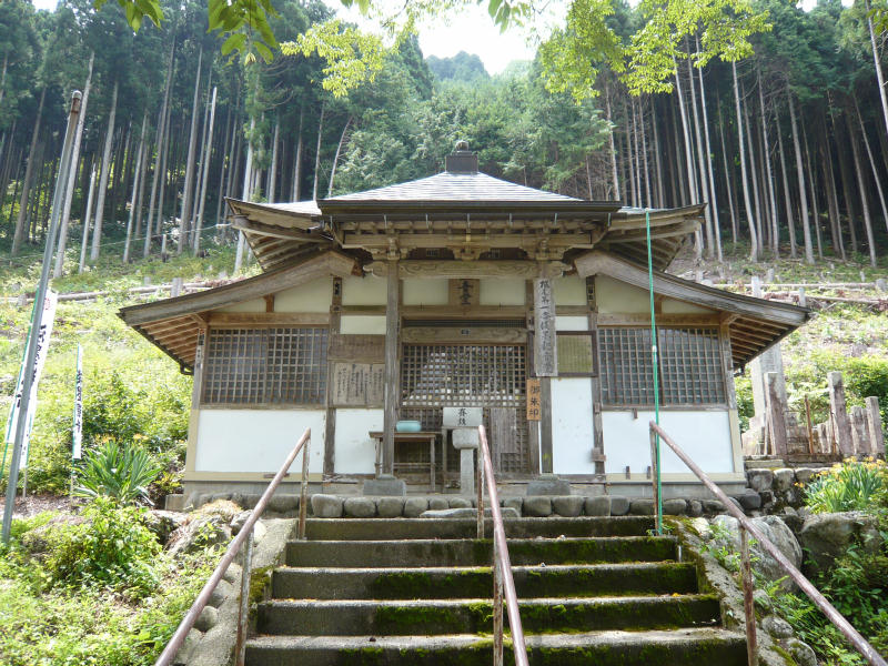 岐阜県本巣市、うすずみ観音